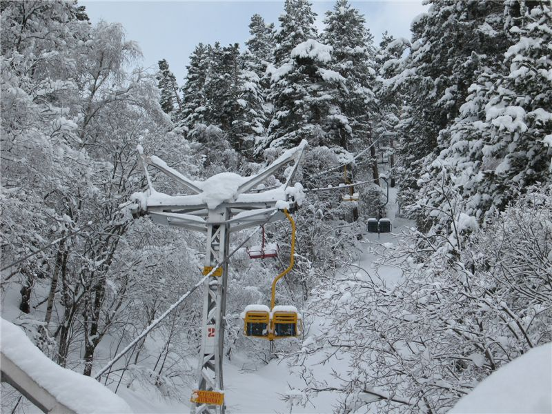 Первая очередь Чегета. Двукресельный подъёмник. Вид на двукреселку после снегопадов.